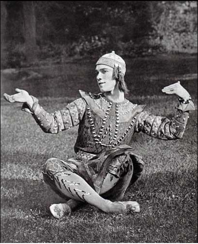 Nijinsky in Danse Siamoise (Siamese Dance)in Les Orientales